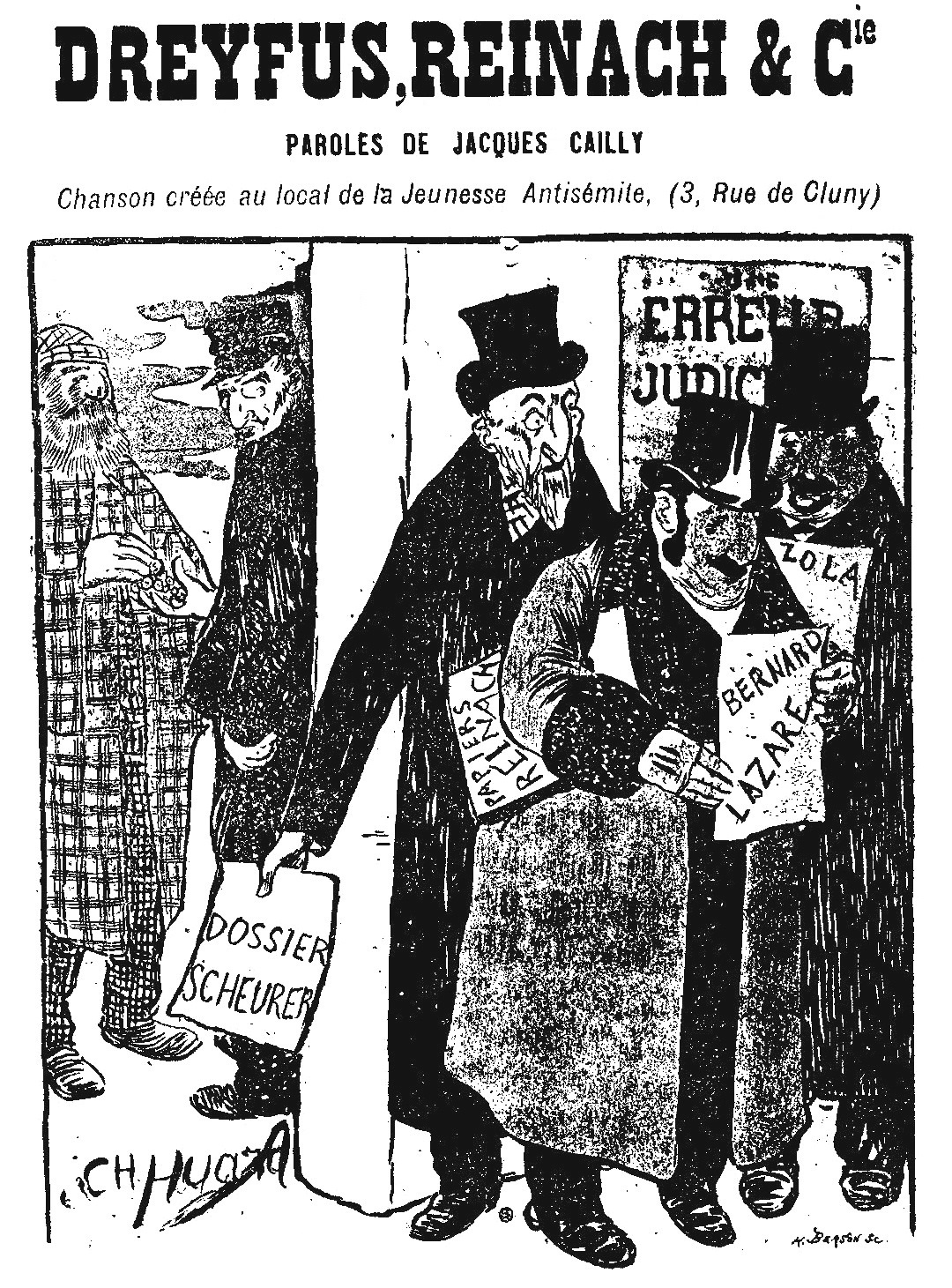 Dreyfus, Reinach & Cie. Paroles de Jacques Cailly. Chanson créée au local de la Jeunesse antisémite (3, rue de Cluny). "Couverture de chanson colportée dans les rues (Léon Hayard, éditeur)". Une variante du dessin, légendée "Judas et ses fères", a été publiée en une de La Libre Parole illustrée du 14 novembre 1896.